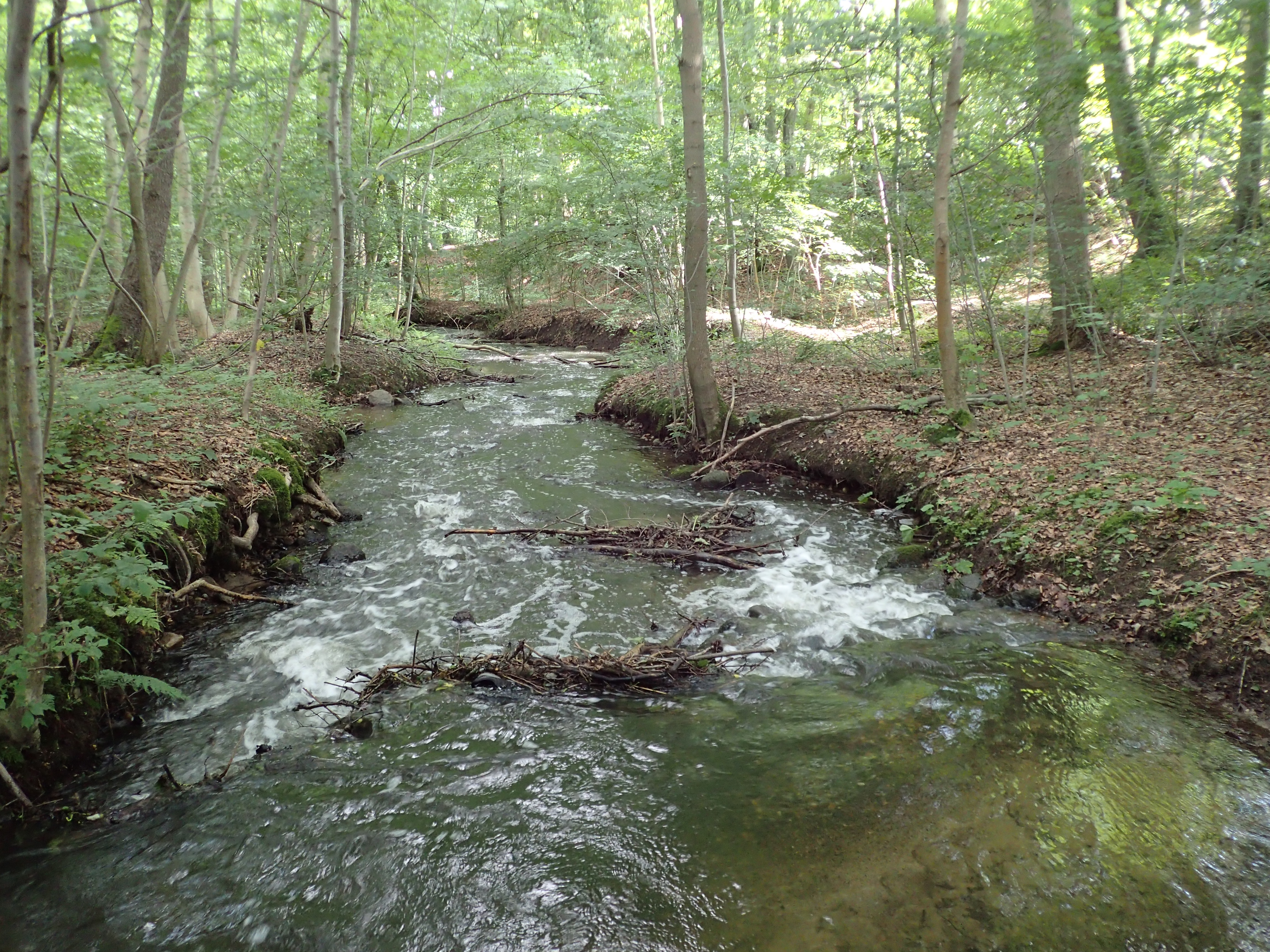 Voldbækken fotograferet nedstrøms på sit løb gennem skovdelen af Aarslev Møllepark.